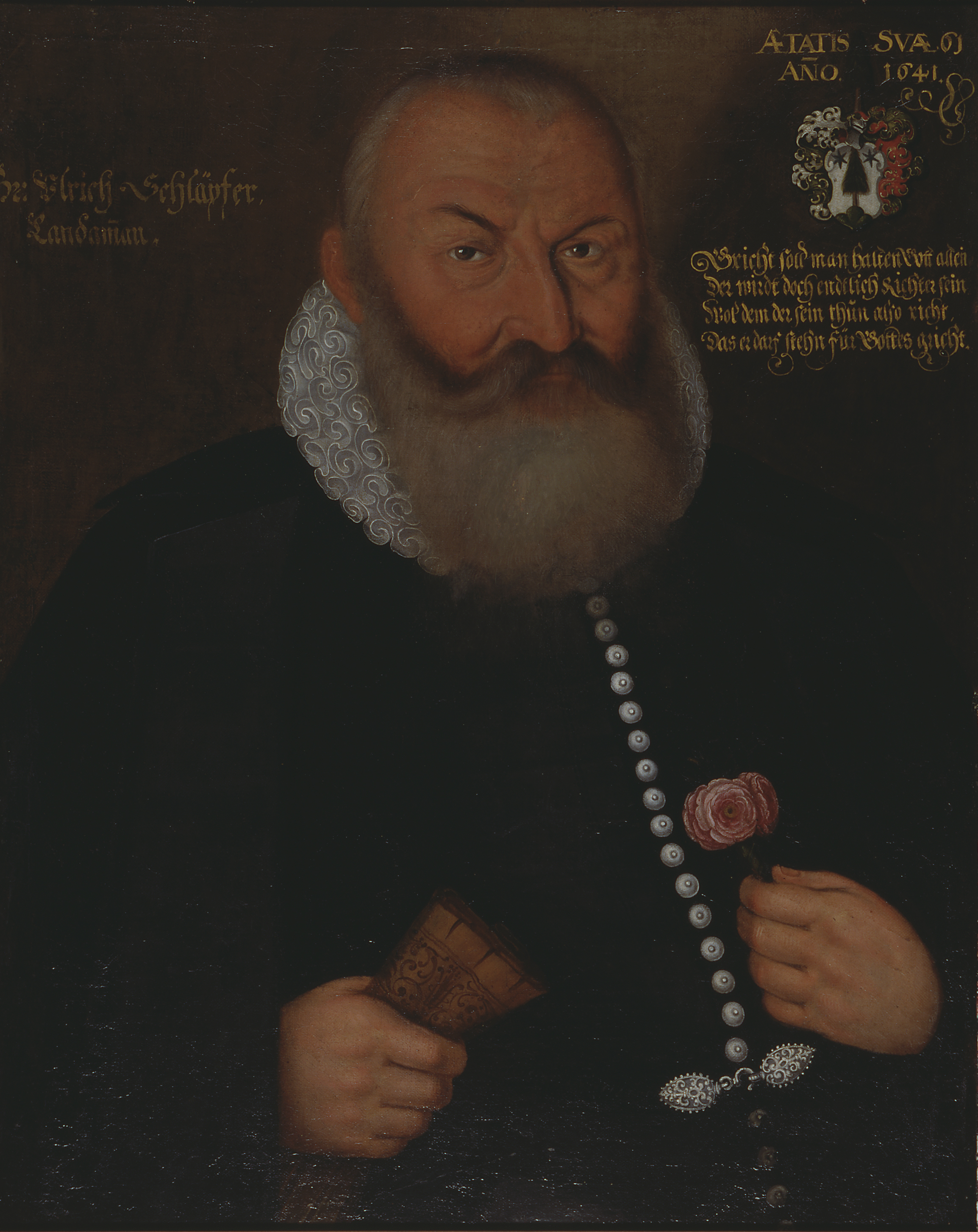 8. Landammann von Appenzell Ausserrhoden, Brustbildnis